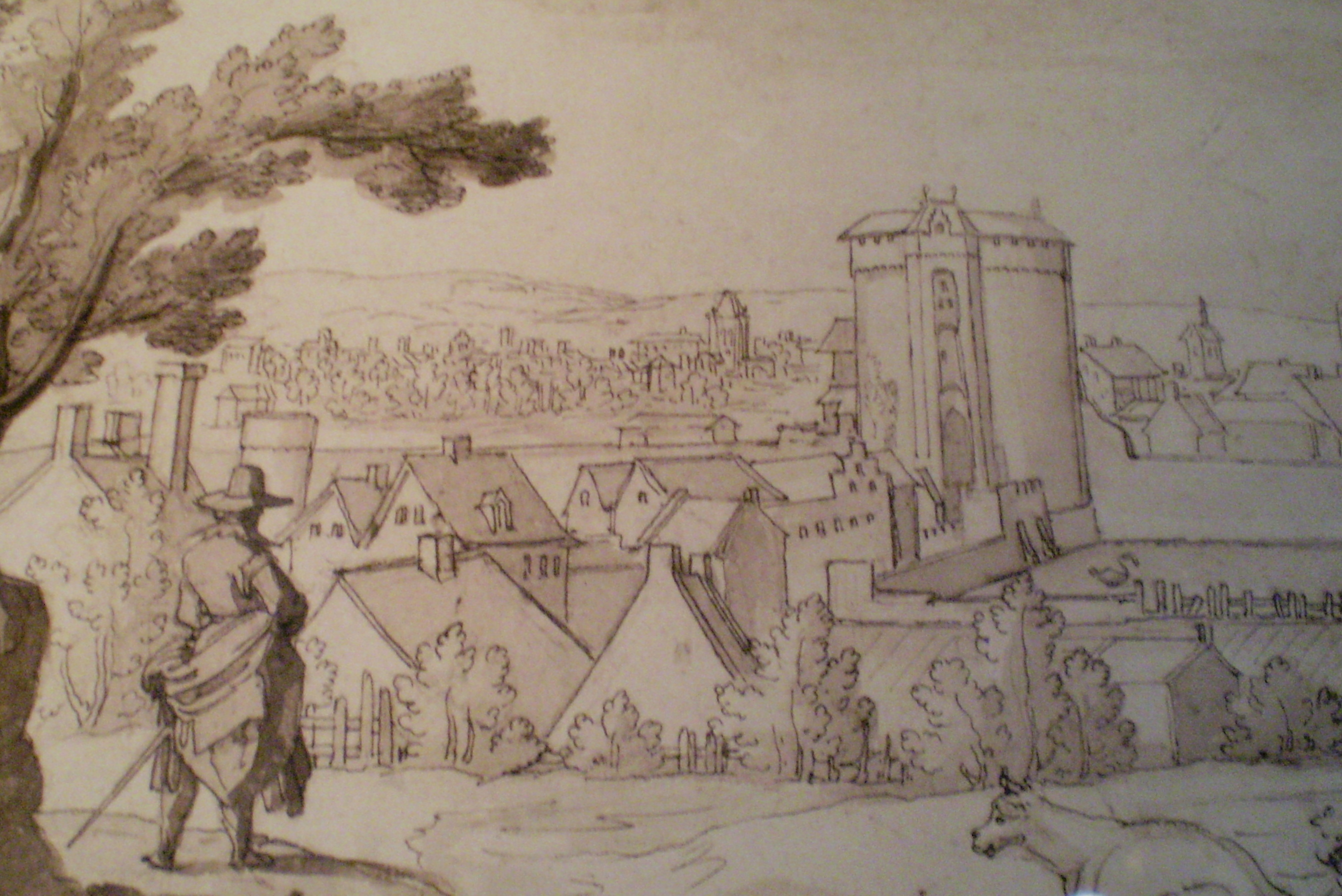 Saint-Gilles, la porte de Hal et le sud de Bruxelles (détail) - plume et lavis à l'encre brune sur papier - Musée royaux des Beaux-Arts de Belgique